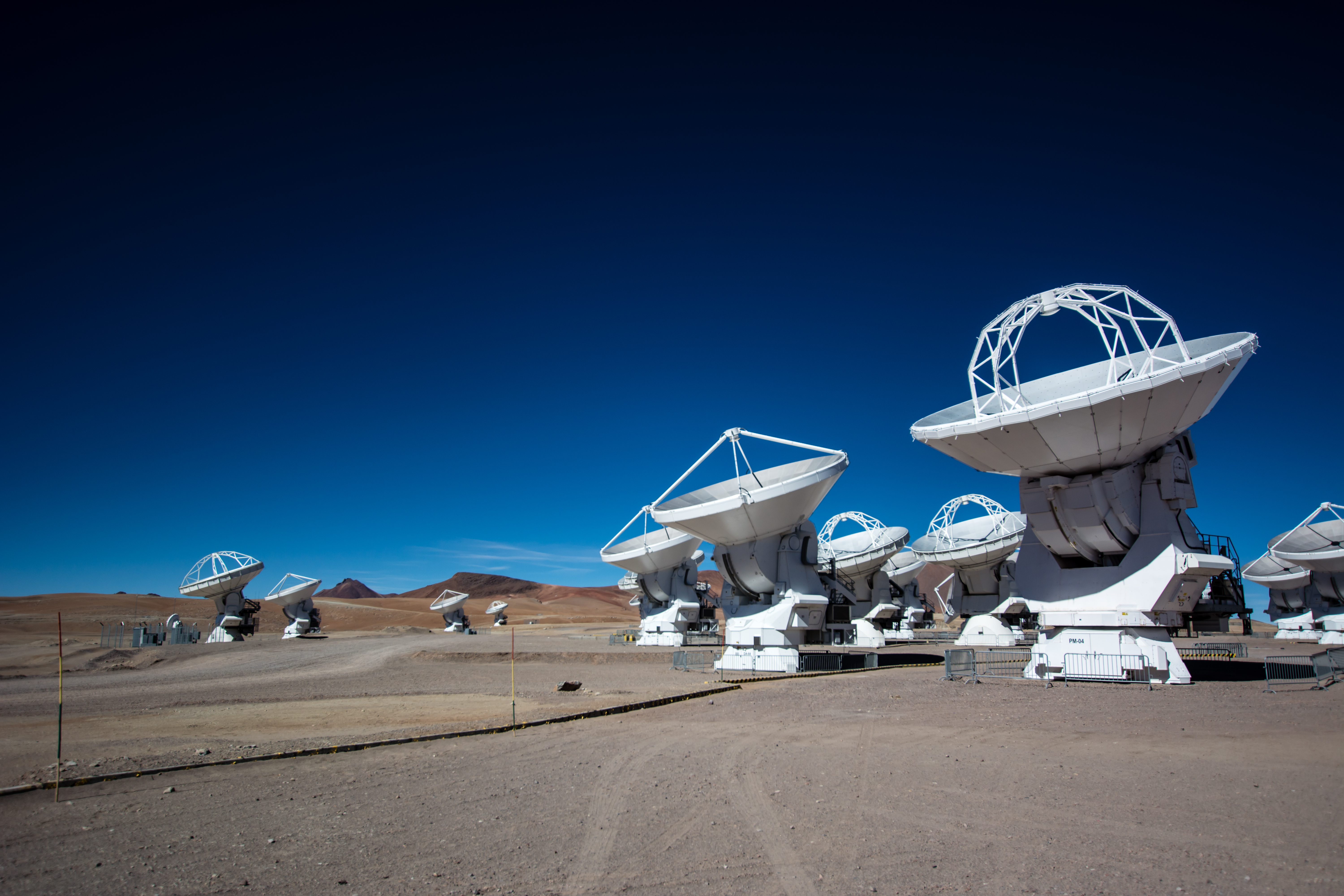 Reserva nacional Los Flamencos